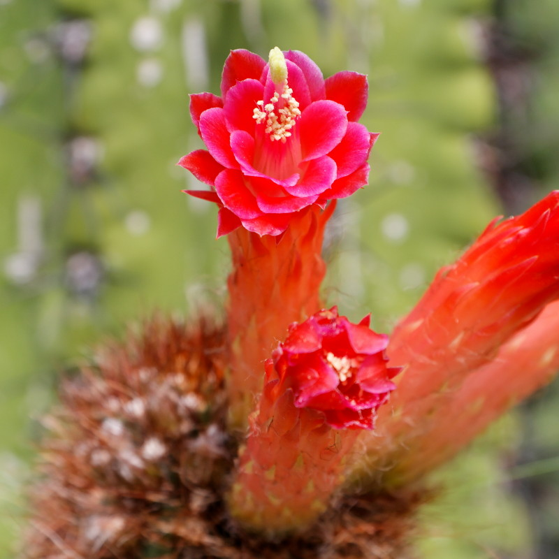 Cleistocactus icosagonus